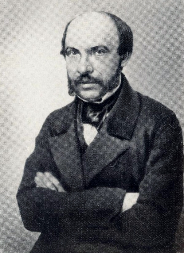 Photo of Wassily Botkin 1812—1869), Russian writer (1856); Василий Петрович Боткин (1812—1869), критик и публицист, член кружка Н. В. Станкевича. Фотография